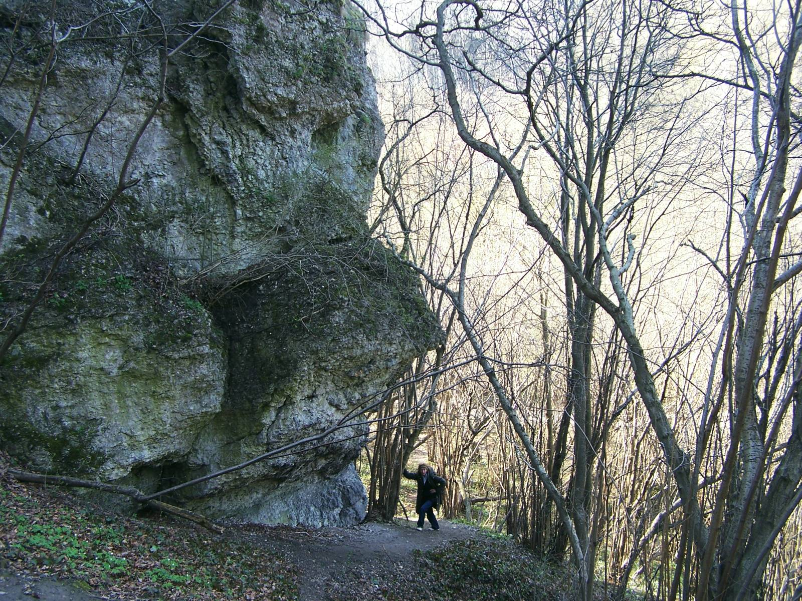 Rezerwat przyrody Zimny Dół